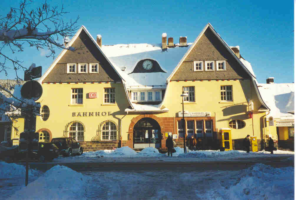 Bahnhof Bad Berleburg Bad Berleburg railway station